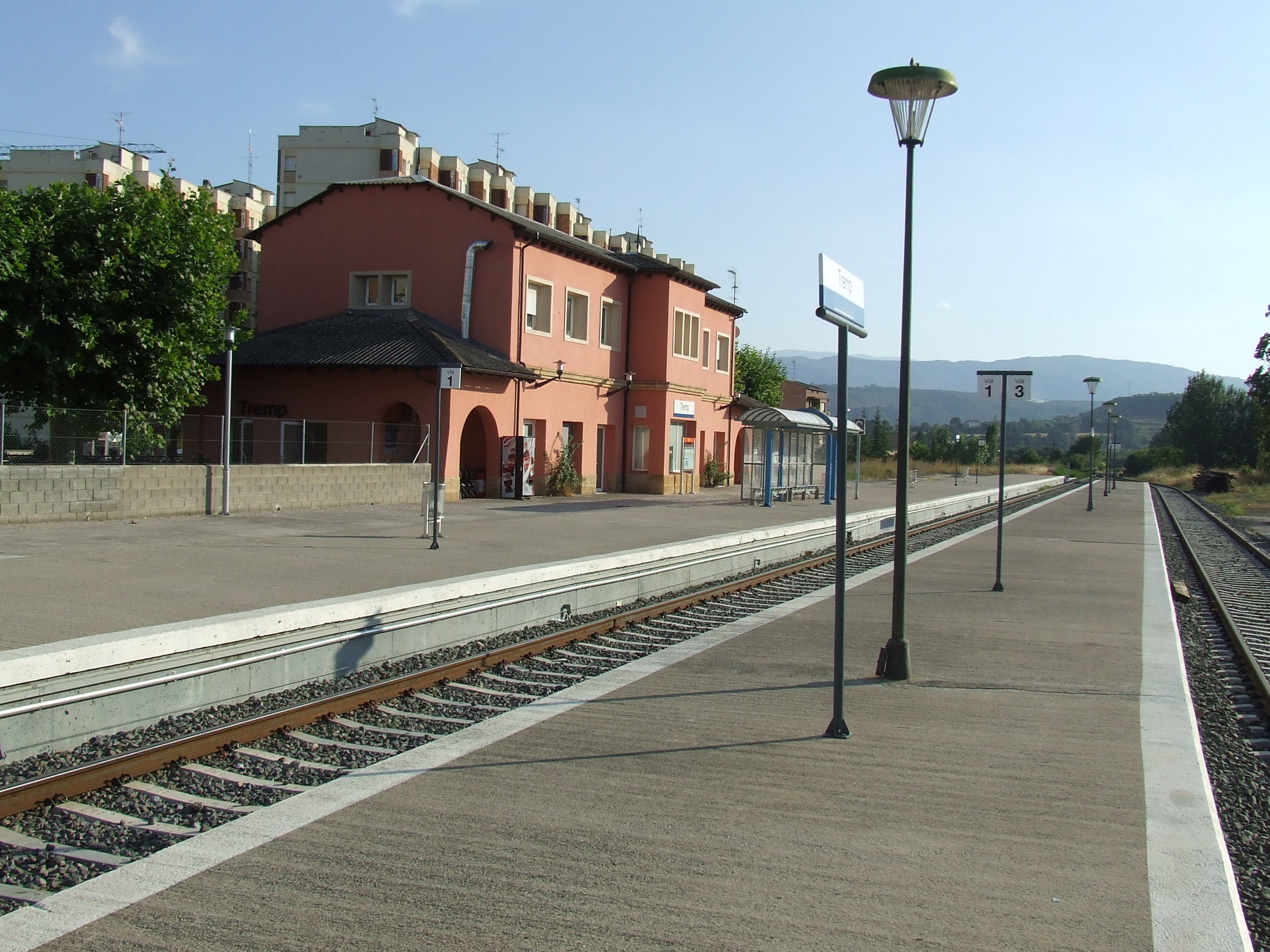 Estació de tren de Tremp (Pallars Jussà)